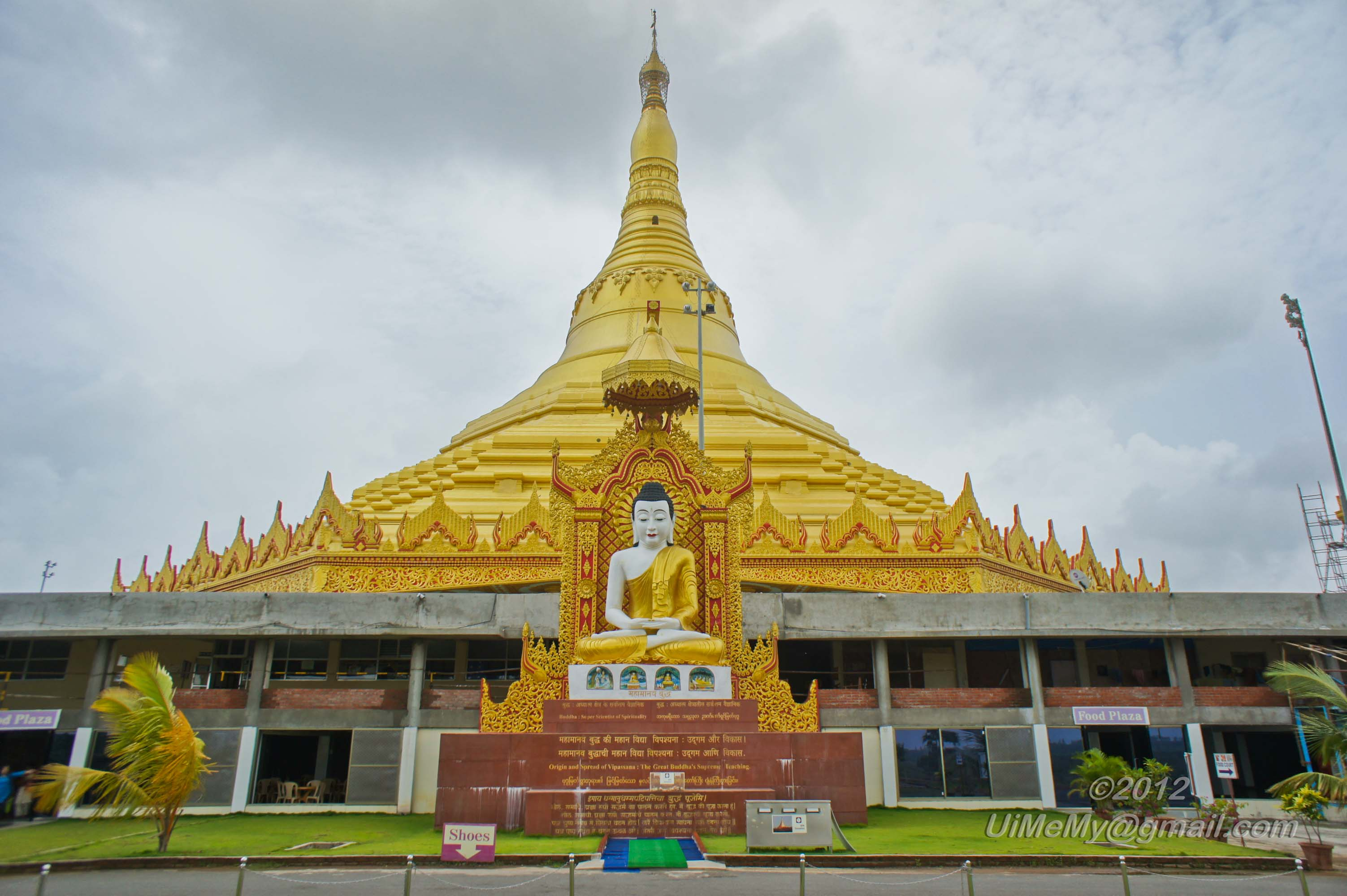 Global Pagoda,Gorai,Meera Rd-Bhayandar